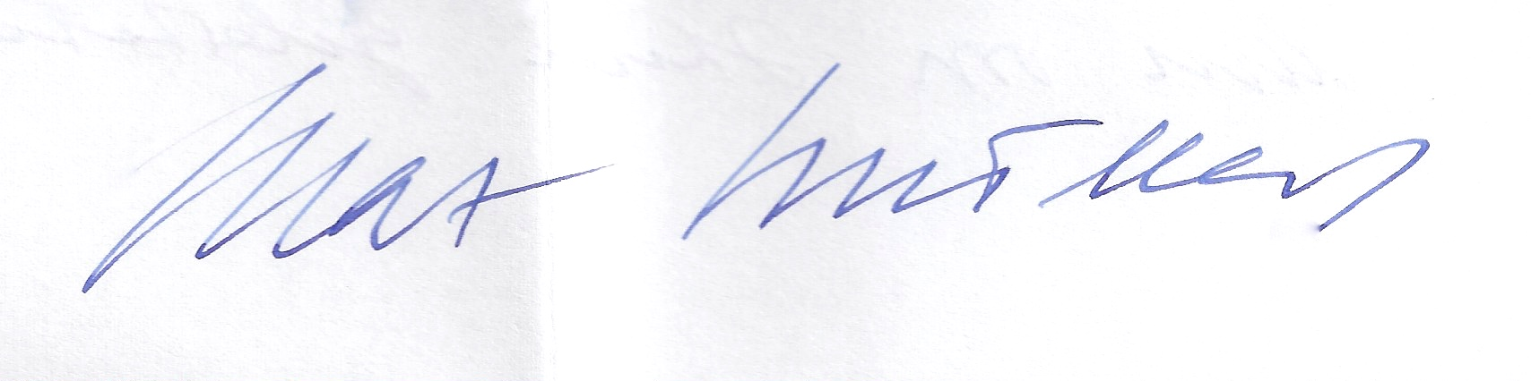 Max Müller, Philosoph. Seine Signatur auf einem von ihm am 6.08.1976 handgeschriebenen Brief an mich.